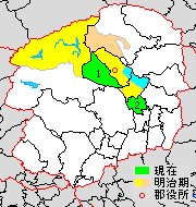 栃木県塩谷郡の範囲（1.塩屋町 2.高根沢町 3.塩原町 薄青.昭和期の編入